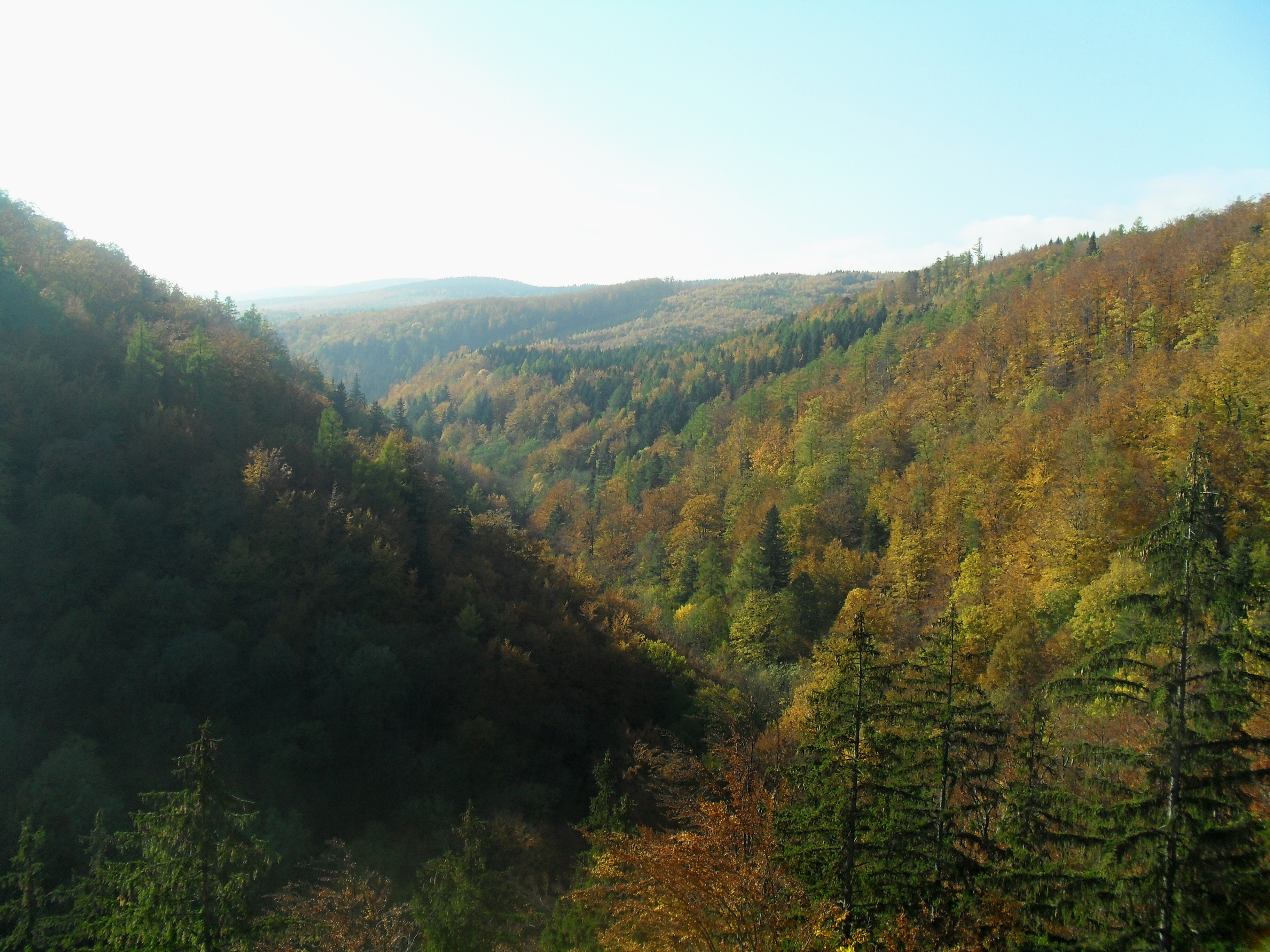 račí údolí